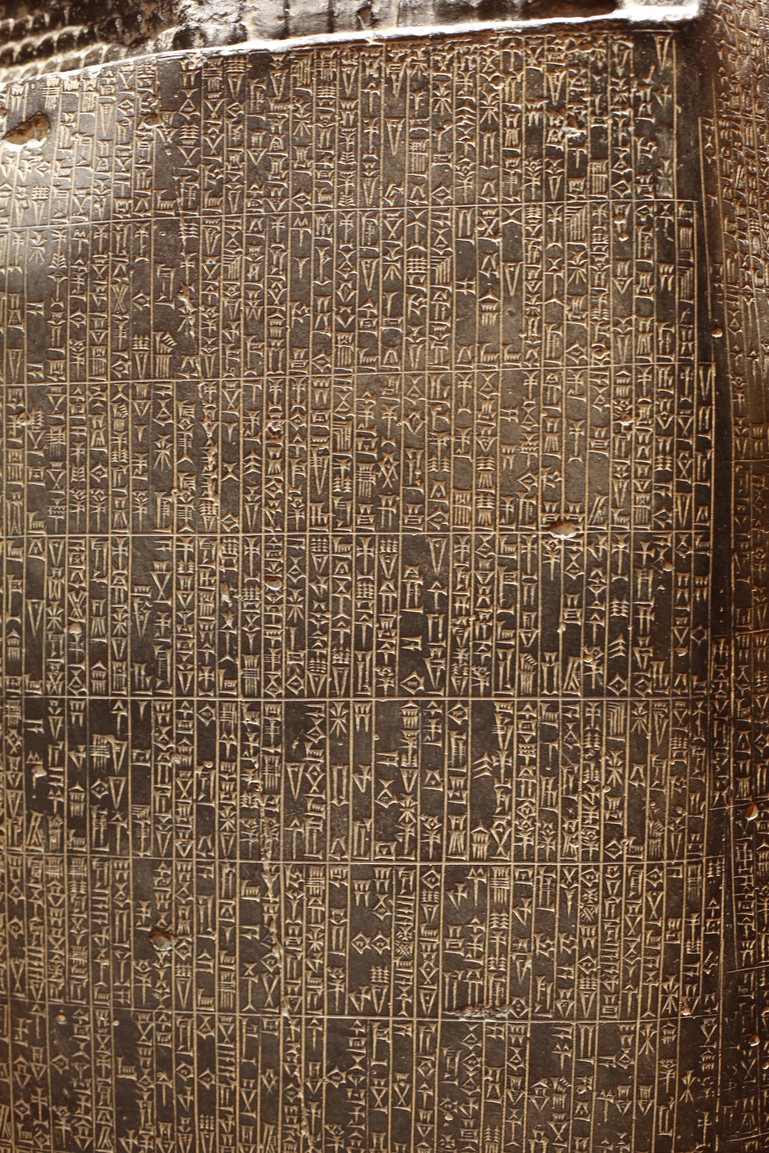 Détail du code de Hammurabi au musée Champollion (Figeac).